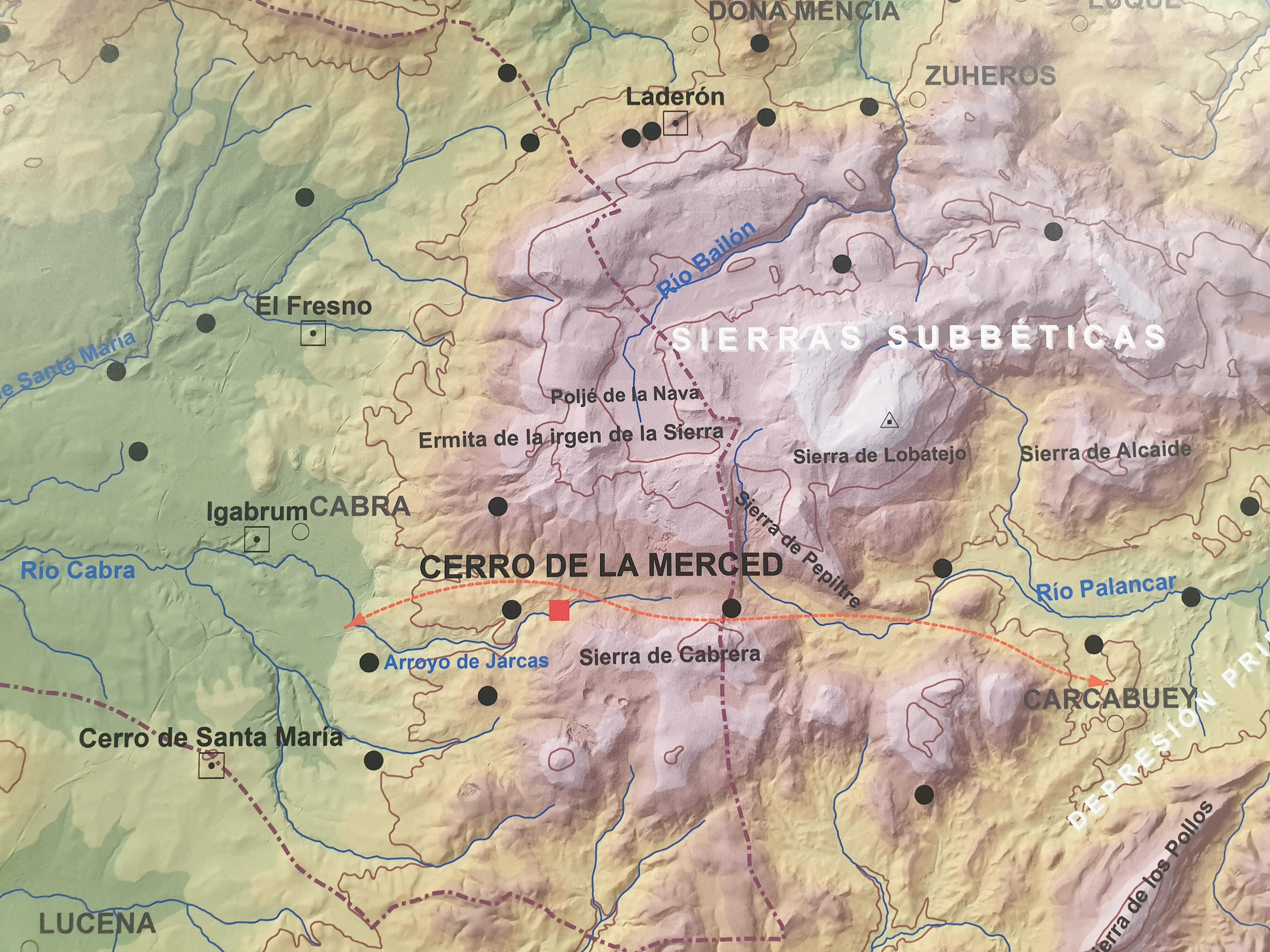 Mapa de situación del Cerro de la Merced en Cabra